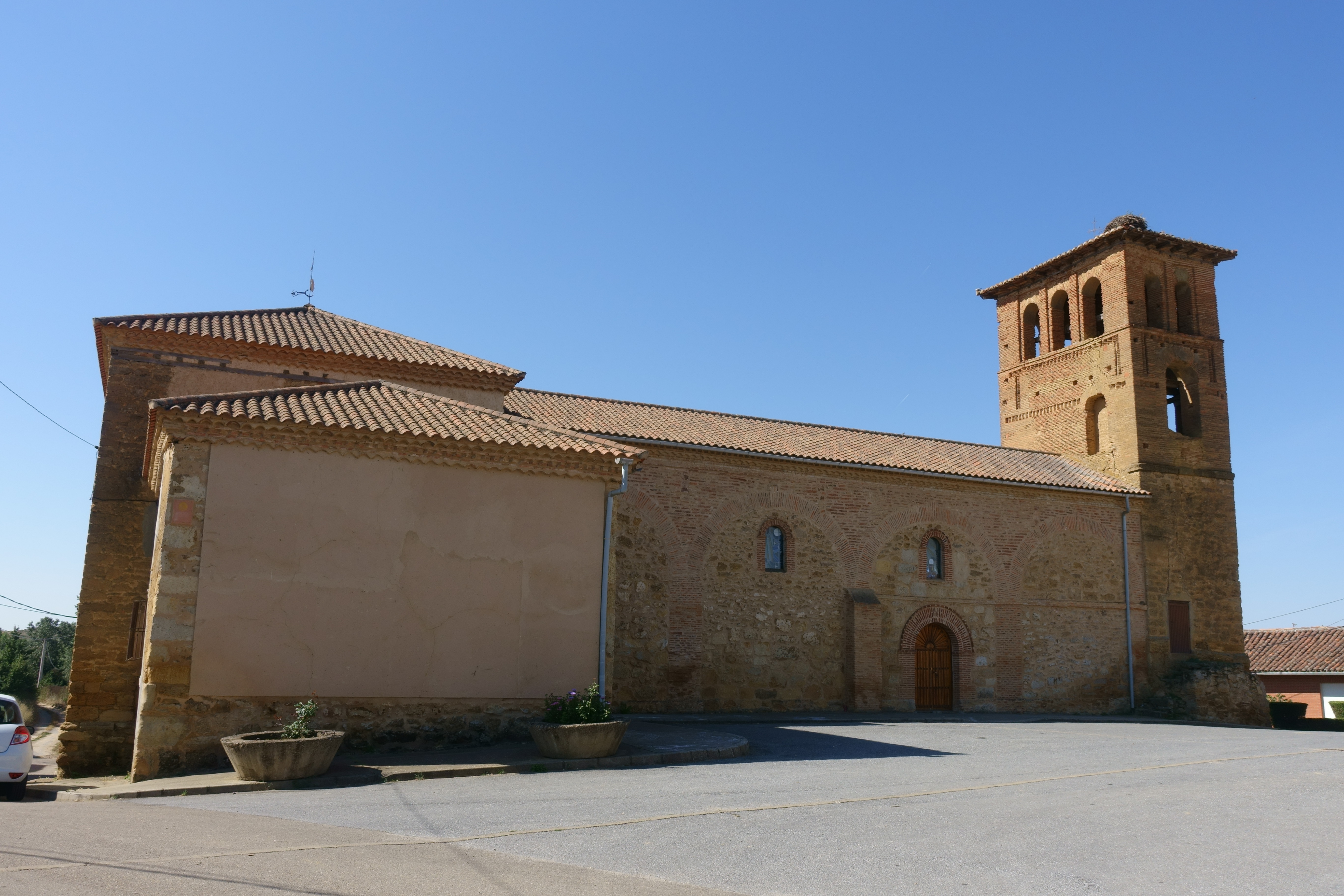 Iglesia de San Martín, en Cea (León, España).